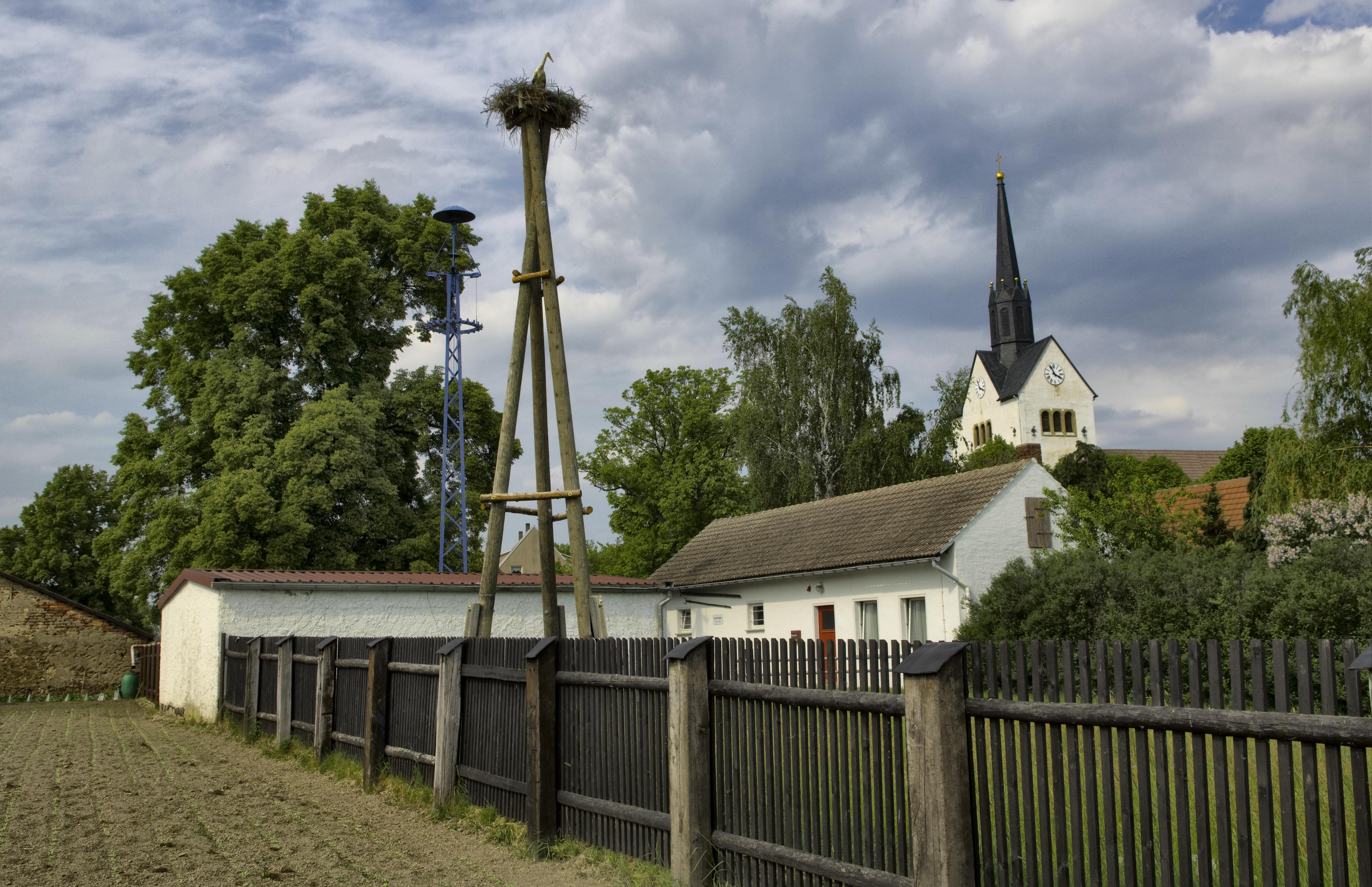 Deutsch Luppa - Feuerwehr und besetztes Storchennest